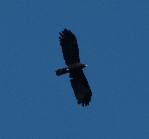 Ictinaetus malayensis, Biligirirangan hills, India